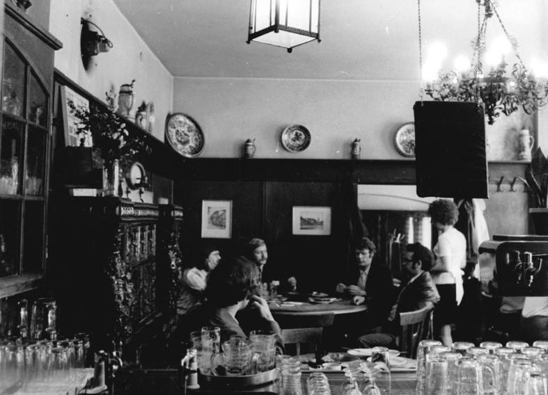 Berlin, Gaststätte "Zur letzten Instanz", Schankraum Zum Beitrag "Wo "Pinselheinrich" einst den Becher hob - Am Stammtisch in der "Letzten Instanz" " ADN-ZB Sturm-18.7.1975 In der Gaststube des ältesten Lokals der DDR-Hauptstadt, "Zur letzten Instanz", in der Berliner Waisenstraße. Aus allen Winkeln grüßen die verflossenen Jahrhunderte. (Bitte beachten Sie hierzu auch die Motive P0718-314N u. 315N)